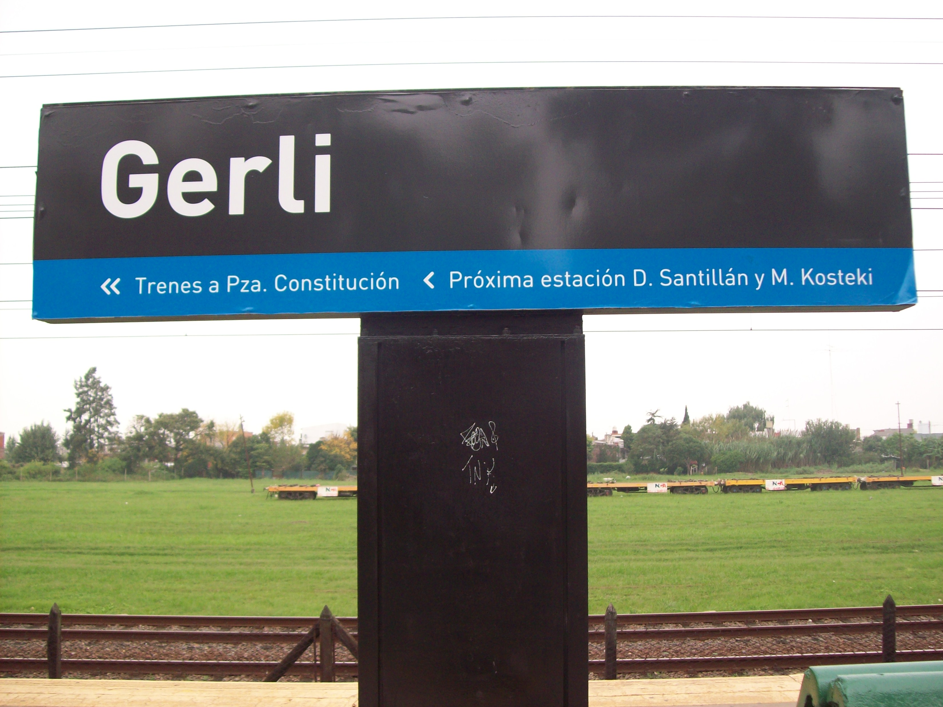 Estación ferroviaria de la ciudad de Gerli